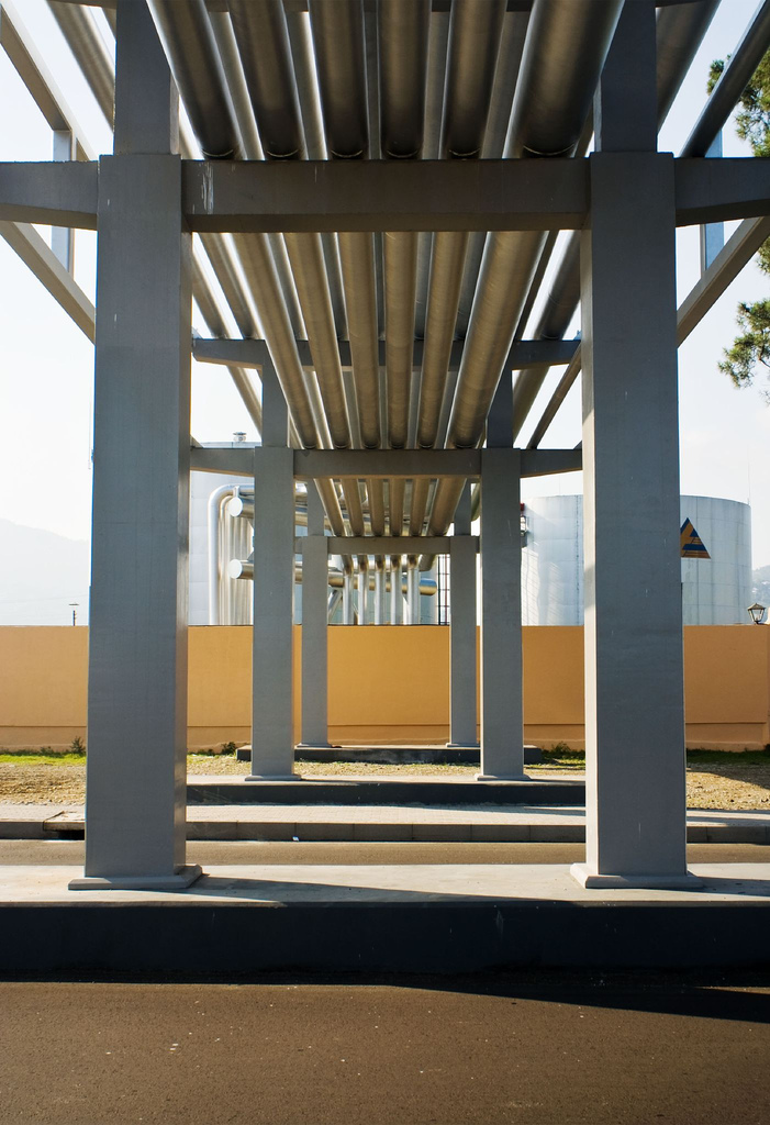 Oil pipeline / pipeline bridge, Batumi.